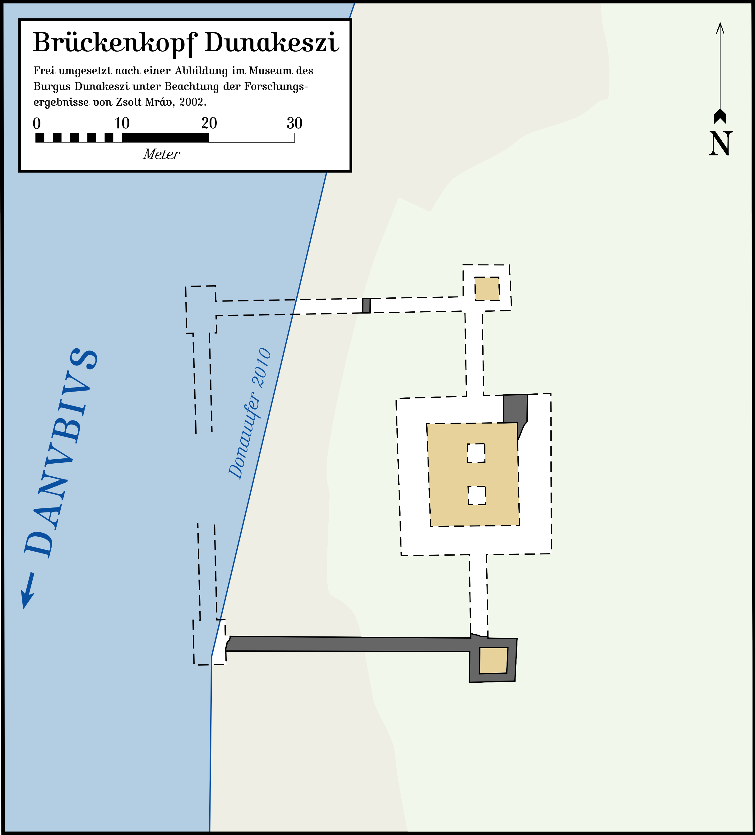 Der spätrömische Brückenkopf Dunakeszi am pannonischen Donaulimes. Die Quellenangabe ist in das Bild eingebunden.